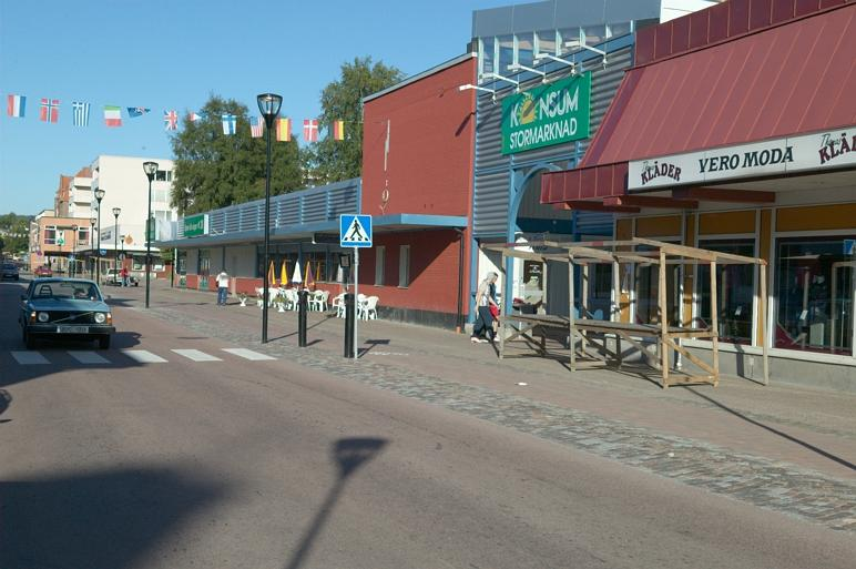 Centrala Filipstad, Viktoriagatan. Motiv: Filipstad Kategori: Stadsmiljö, Affärshus Centrala Filipstad, Viktoriagatan.